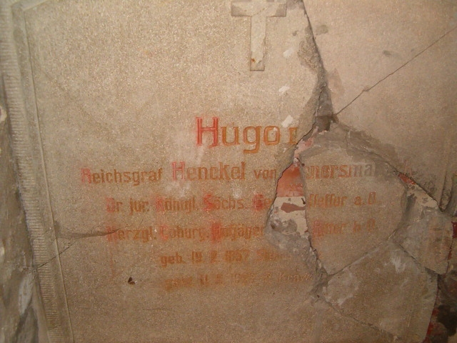 Płyta nagrobna Hugo III. Mauzoleum w Krowiarkach.